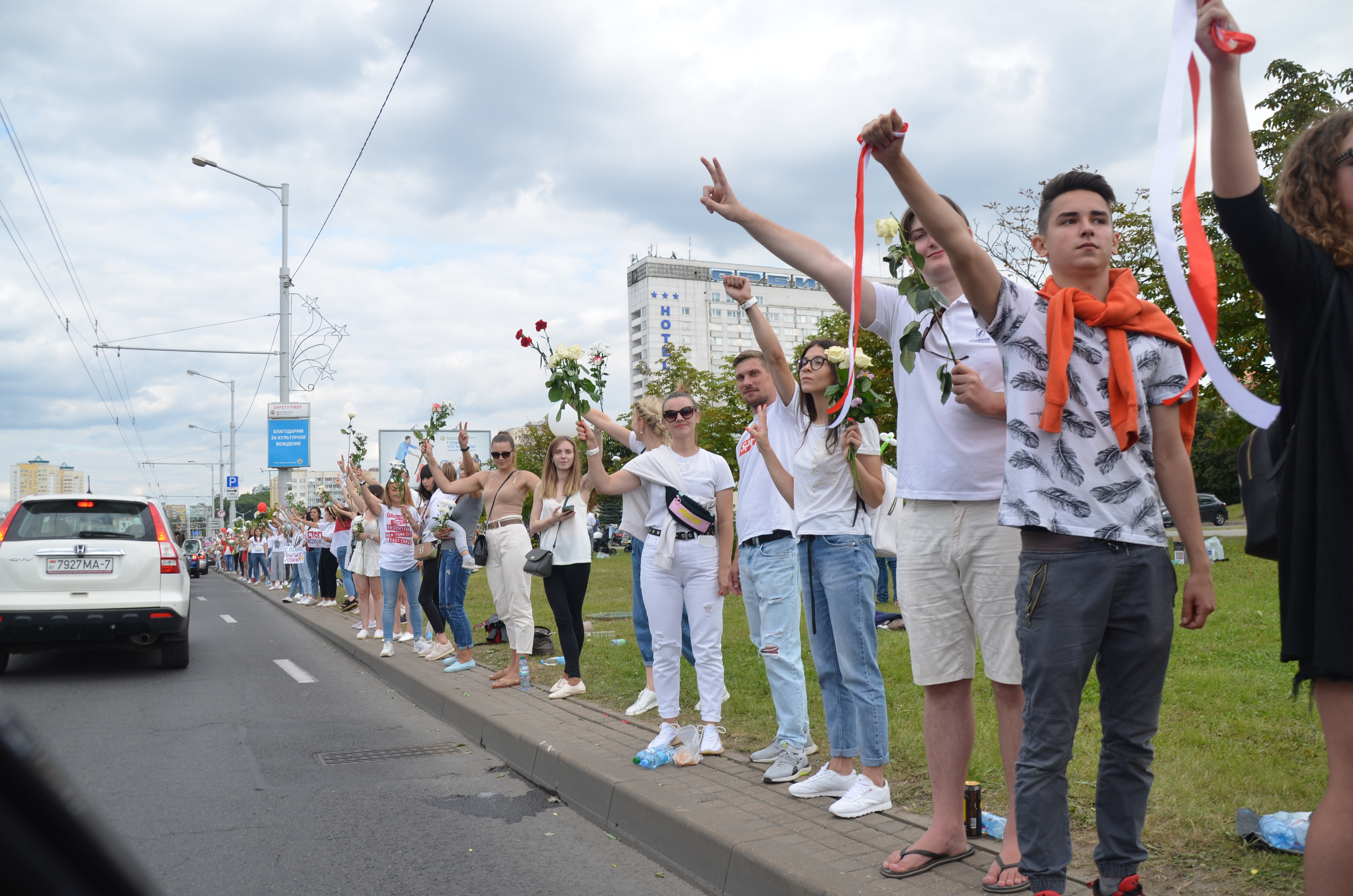 Собрания в Минске вечером 14 августа 2020.